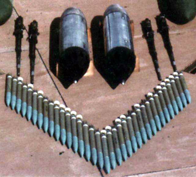 SNEB